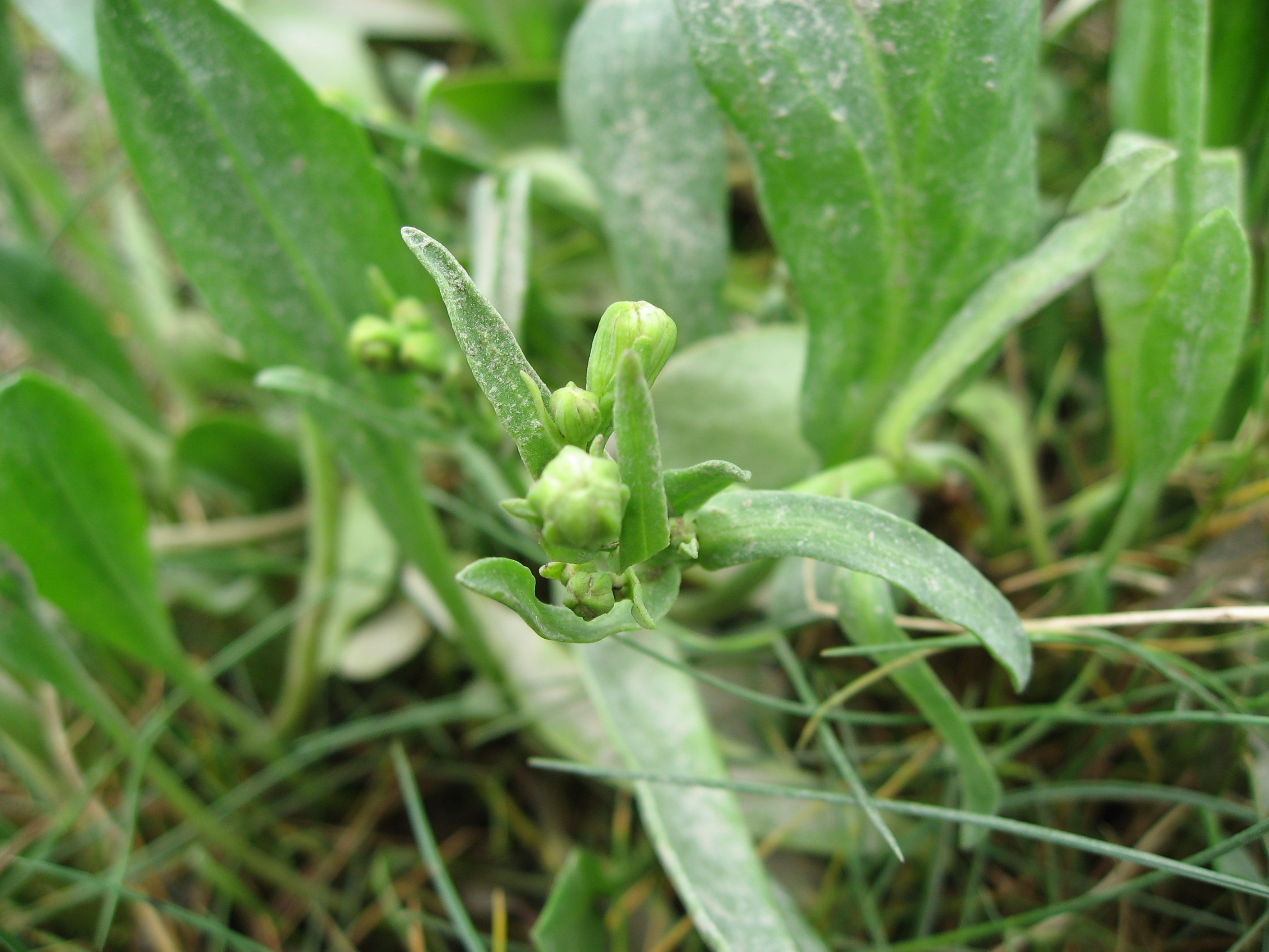 Aster maritime ou Oreille de Cochon (Aster tripolium Syn. Tripolium pannonicum) in Baie de Somme